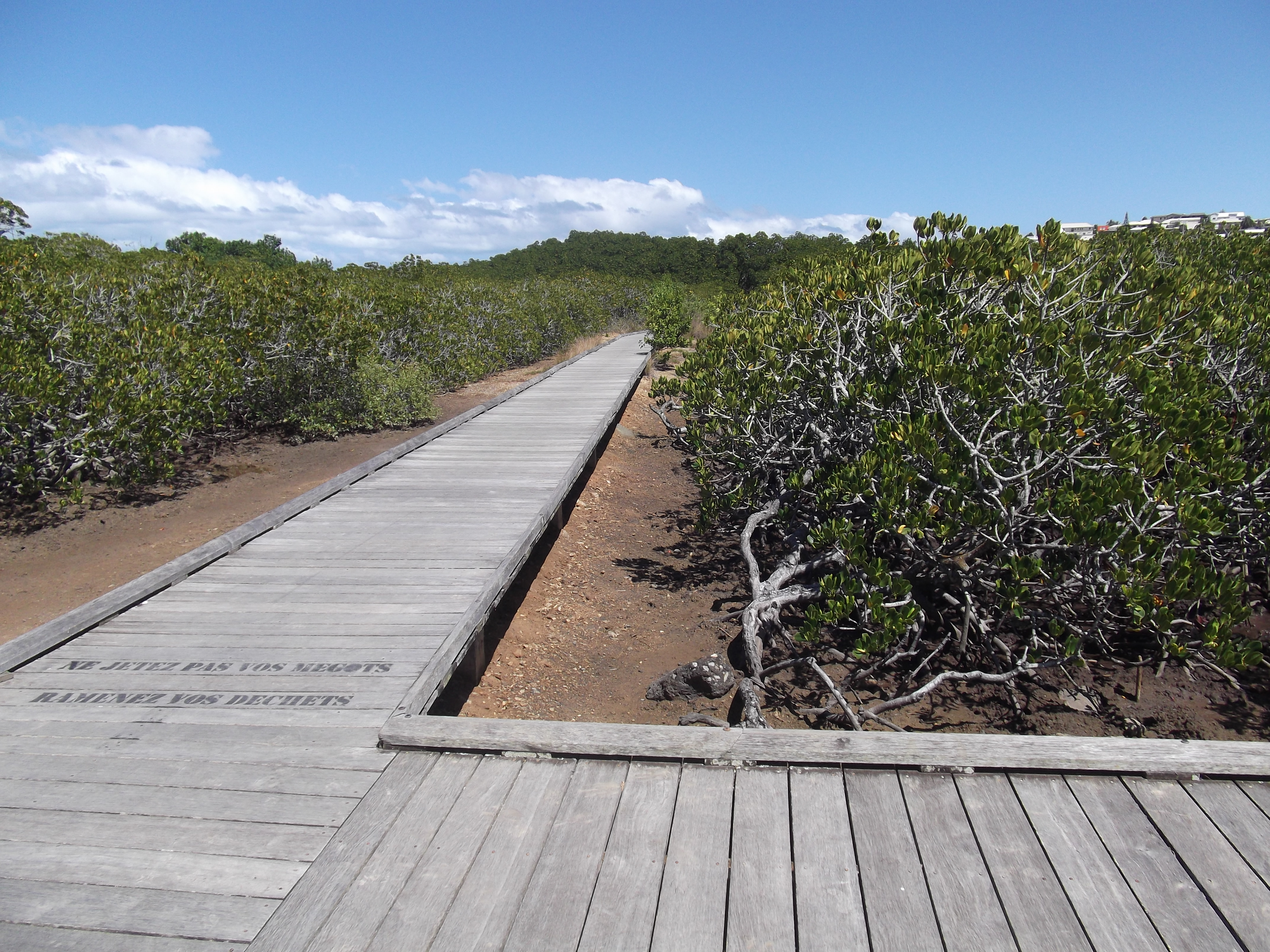 Sentier de découverte de la mangrove dans le quartier de Ouémo, à Nouméa, en Nouvelle-Calédonie